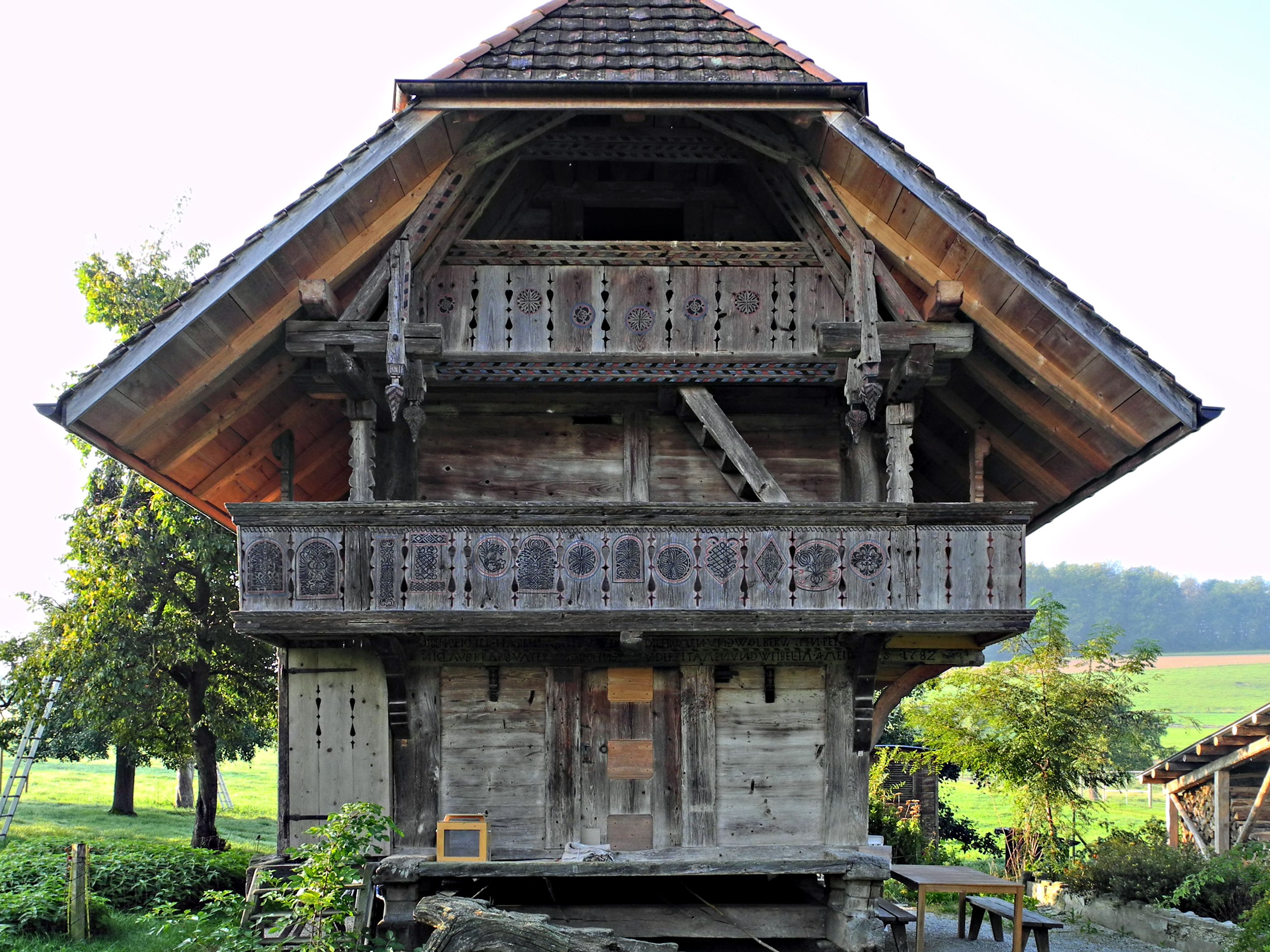 Mühledorf, alter Speicher